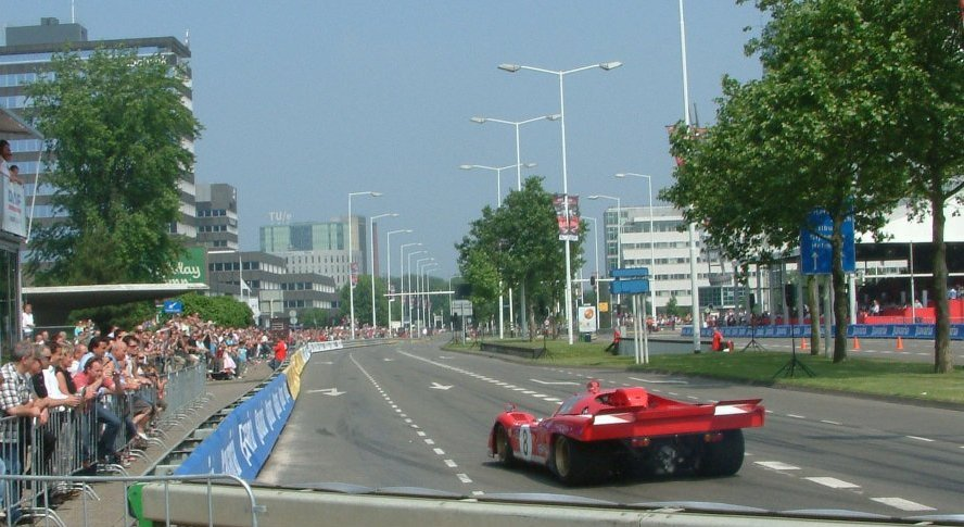 Pole Position in Eindhoven, een evenement met raceauto's, oud en nieuw, expositie en race. Hier het stratencircuit op Fellenoord richting Dordognelaan.